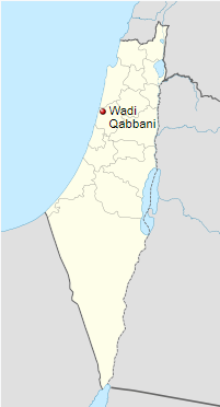 وادي قباني